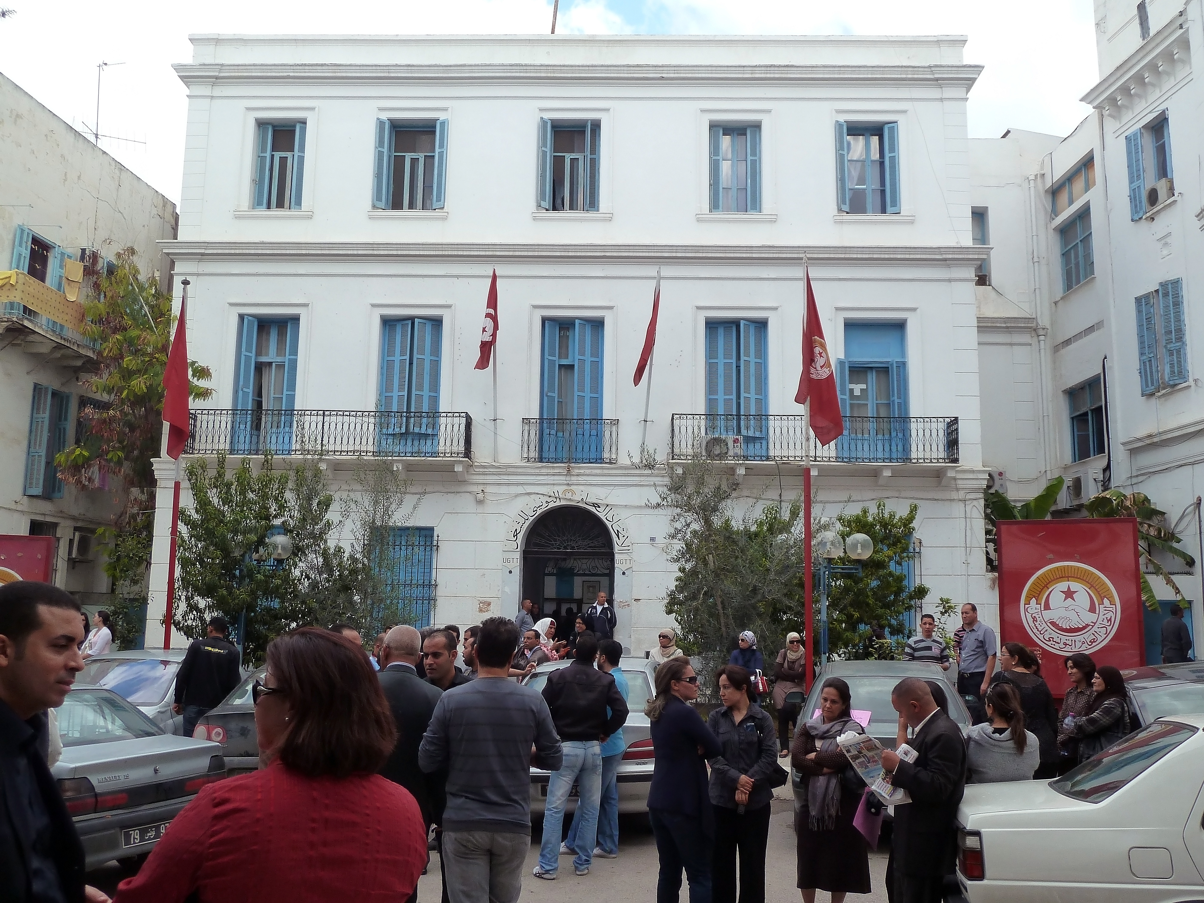 Le siège de l'UGTT (union générale des travailleurs tunisiens), place Mohamed Ali dans le centre de Tunis